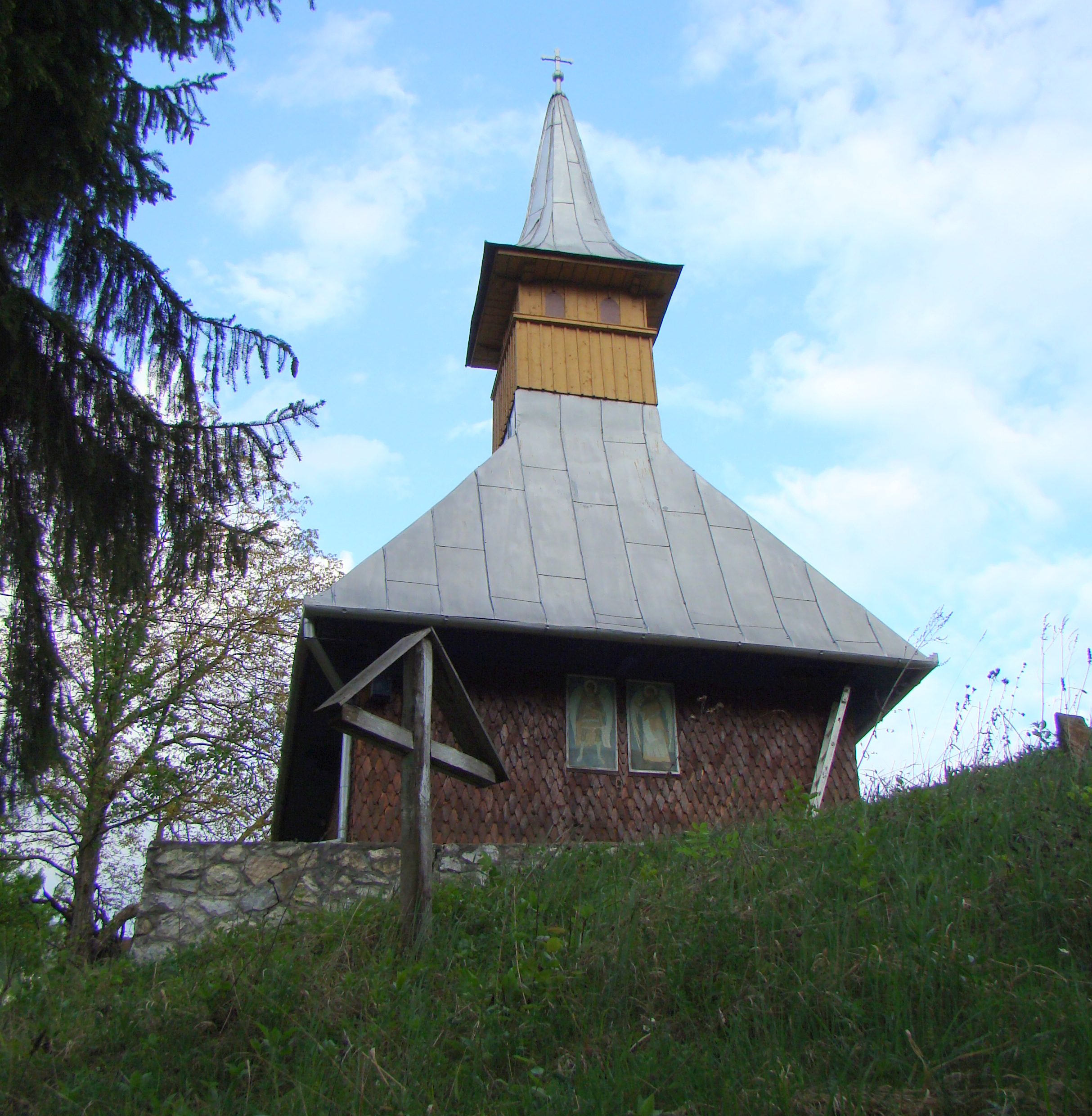 Biserica de lemn din Belioara(Poșaga de Sus)